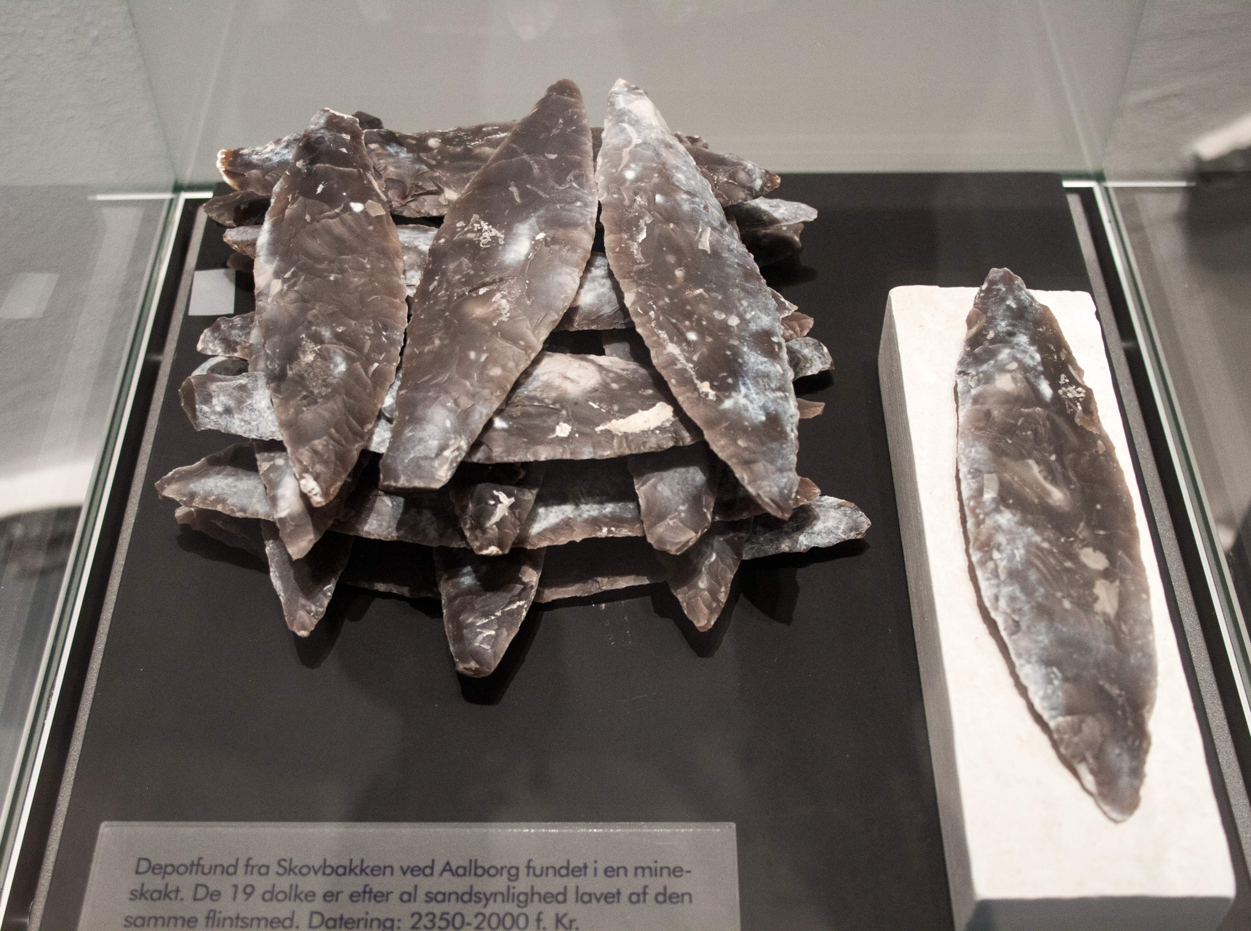 Flint daggers